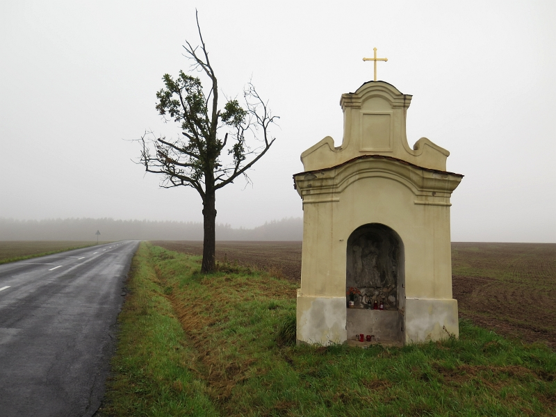 Výklenková kaplička Panny Marie, na hranici k. ú. Svojetín a Janov, Svojetín.